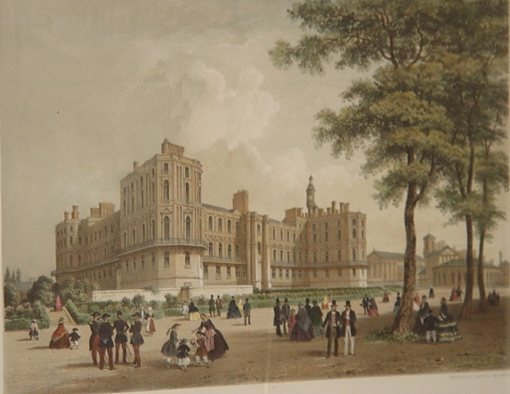 Civils et officiers prenant l'air au pied du château de Saint-Germain, époque Napoléon III